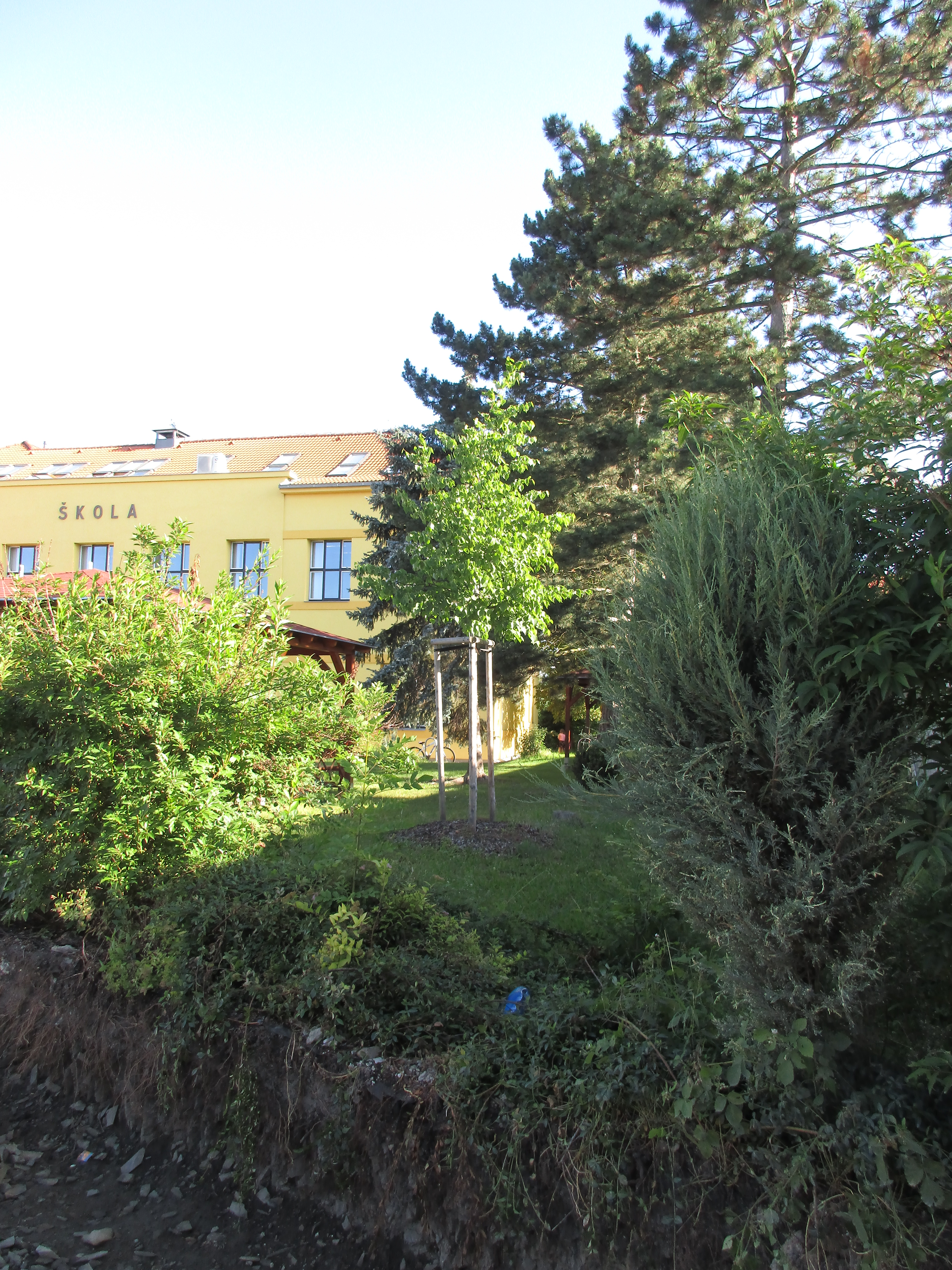 Lípa republiky. Praha 4 - Písnice, Ladislava Coňka. Vysazena 19. října 2018 na památku 100. výročí vzniku Československé republiky.